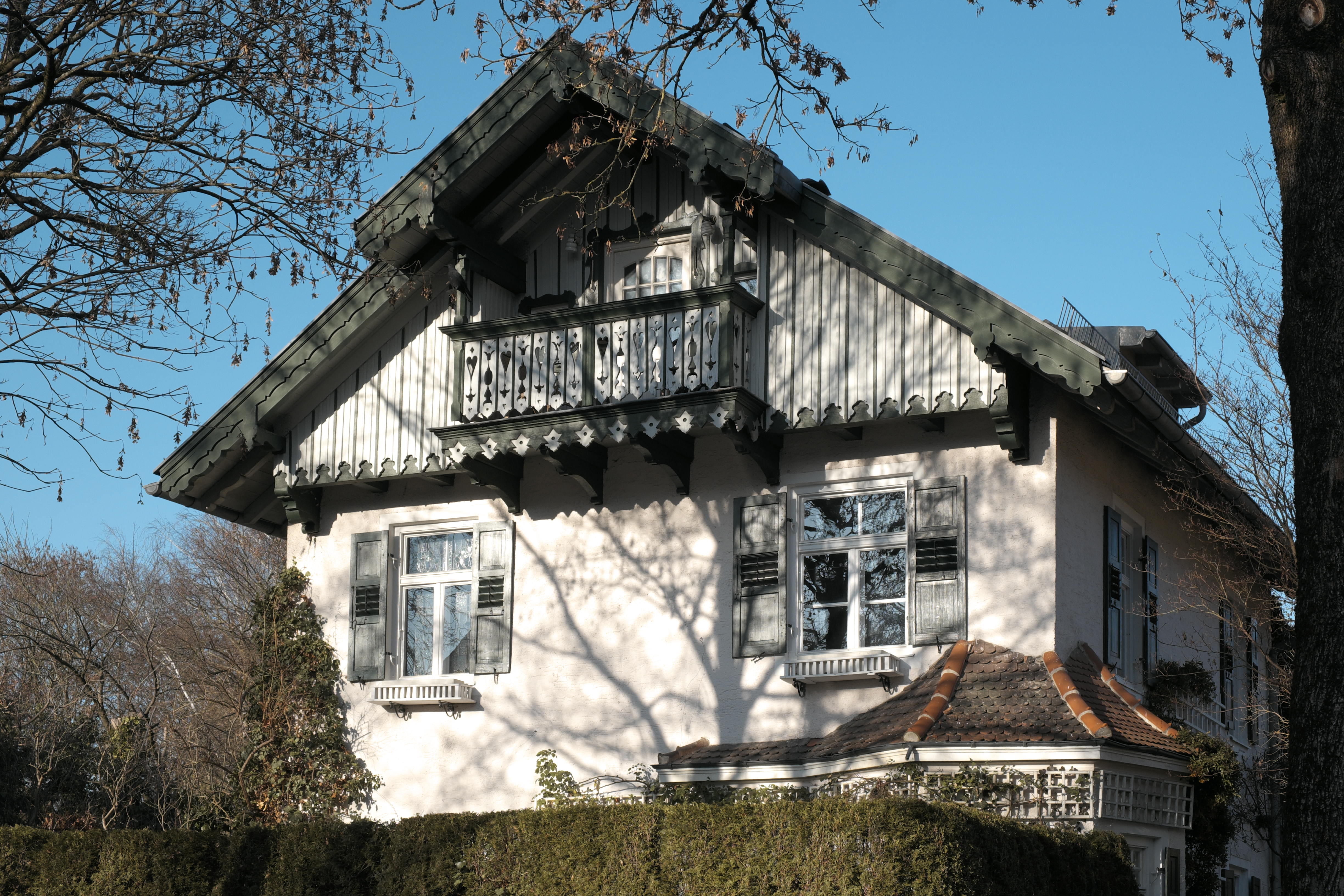 Villa in der Gustav-Meyrink-Straße 8 in Obermenzing im Stadtbezirk Pasing-Obermenzing in München (Bayern/Deutschland)